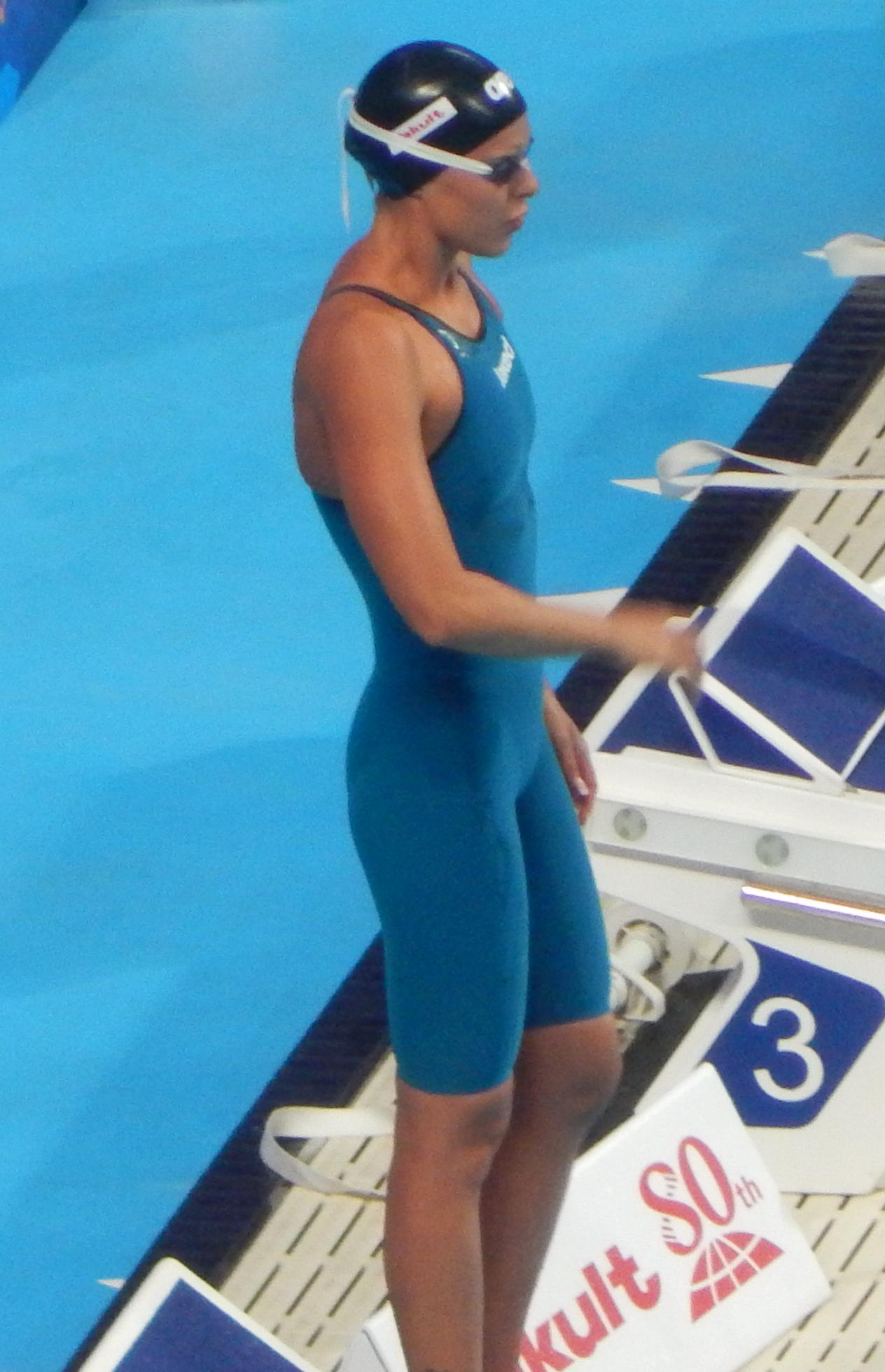 Федерика Пеллегрини в финале 200 метровки вольным стилем в Казани на чемпионате мира